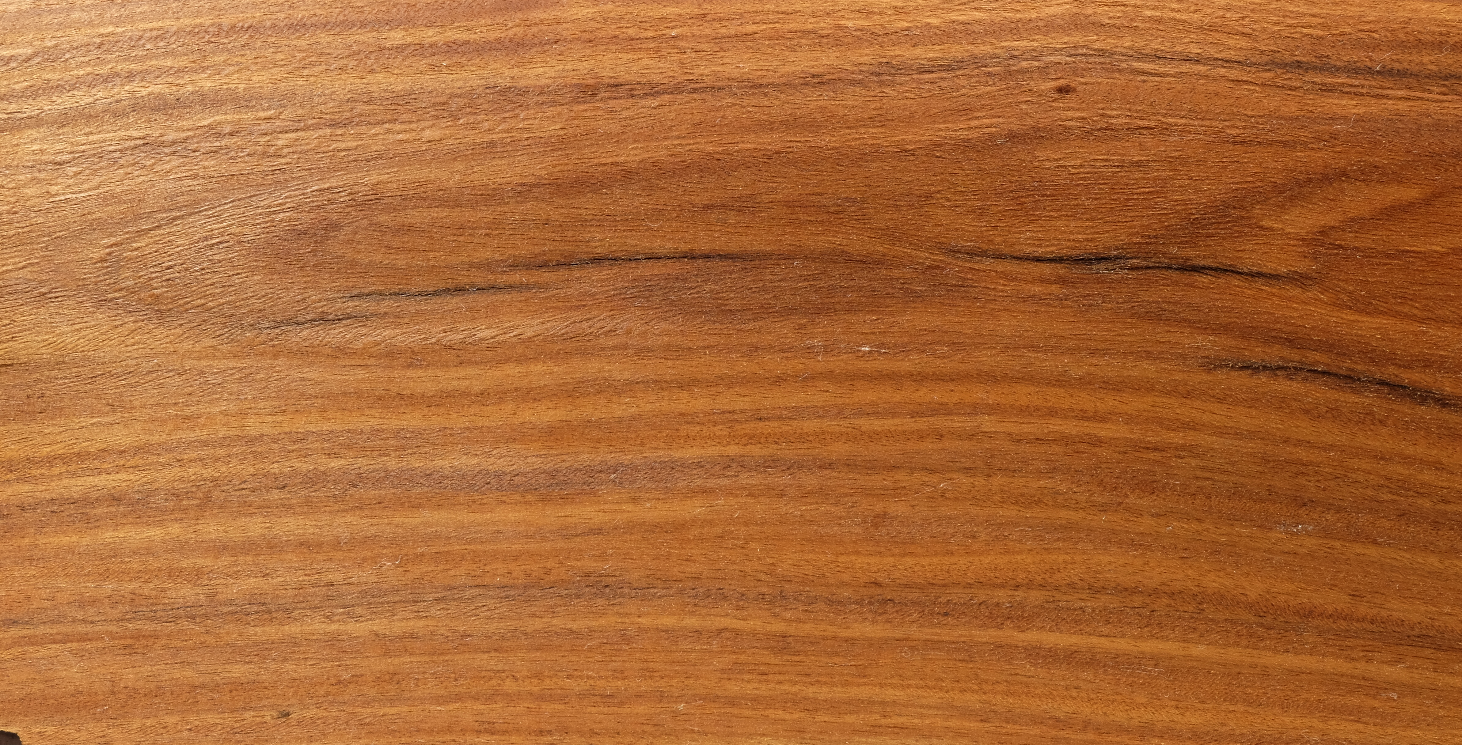 Gemessertes Furnier des Santos Palisanders, geölt, nicht geschliffen.